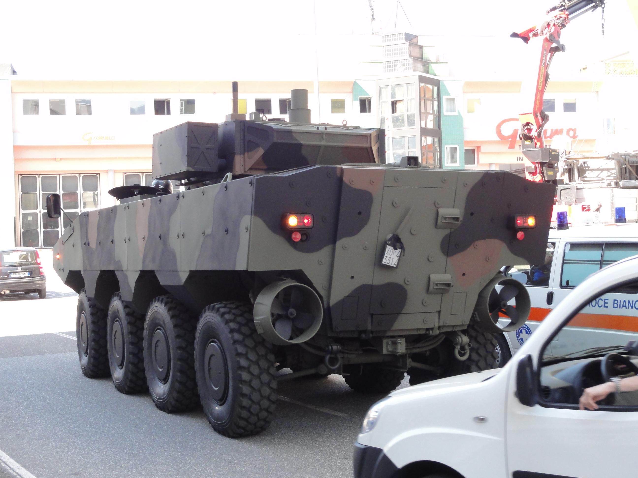 Bozen-Bolzano — SUPERAV